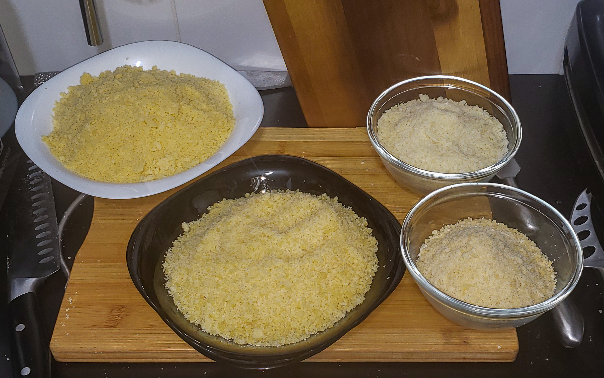 Pão de queijo